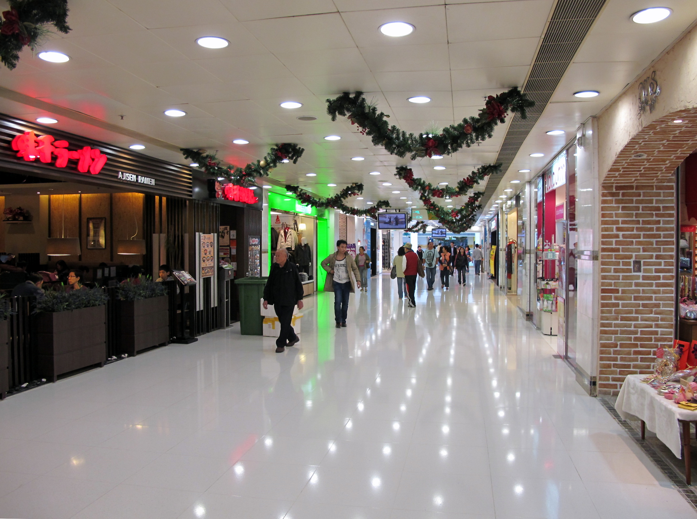 Tai Po Mega Mall Zone C Access